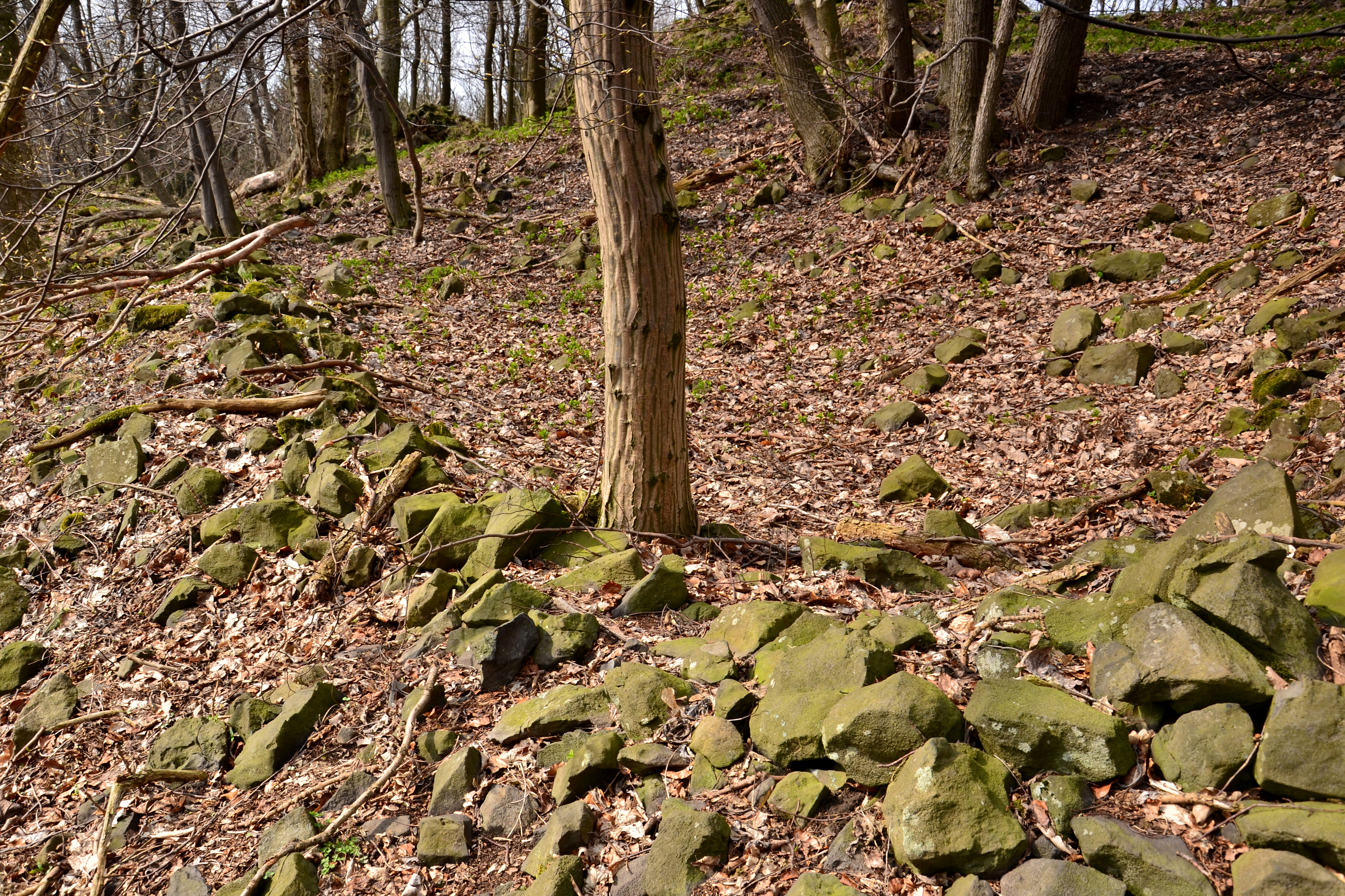 Opevnění za druhou bránou, Hrad Panna, pp. 386, Řepčice (Třebušín).